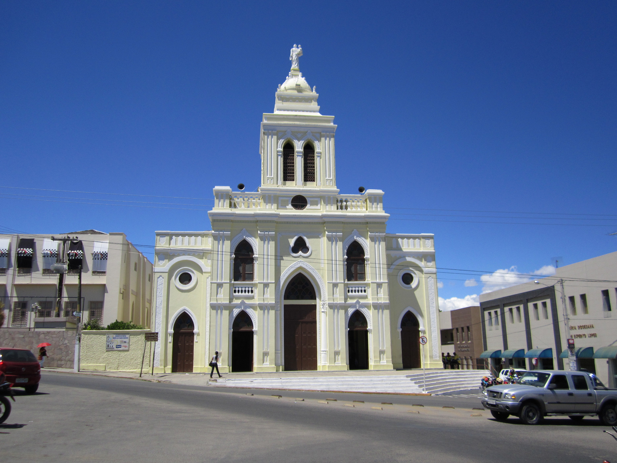 Igreja Matriz de Santo Antônio - Garanhuns, Pernambuco, Brasil